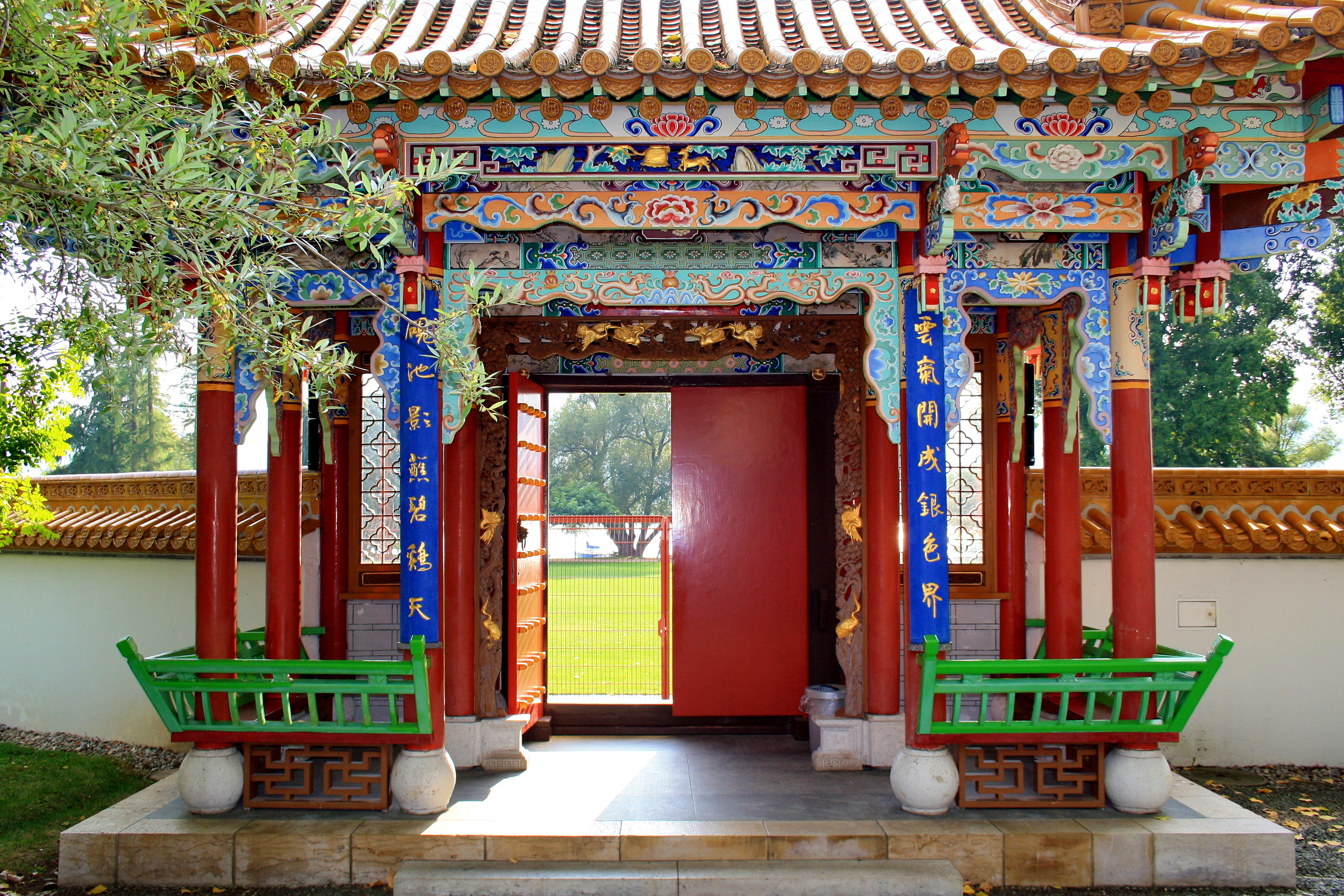 Portal Chinagarten Zürich (Switzerland)